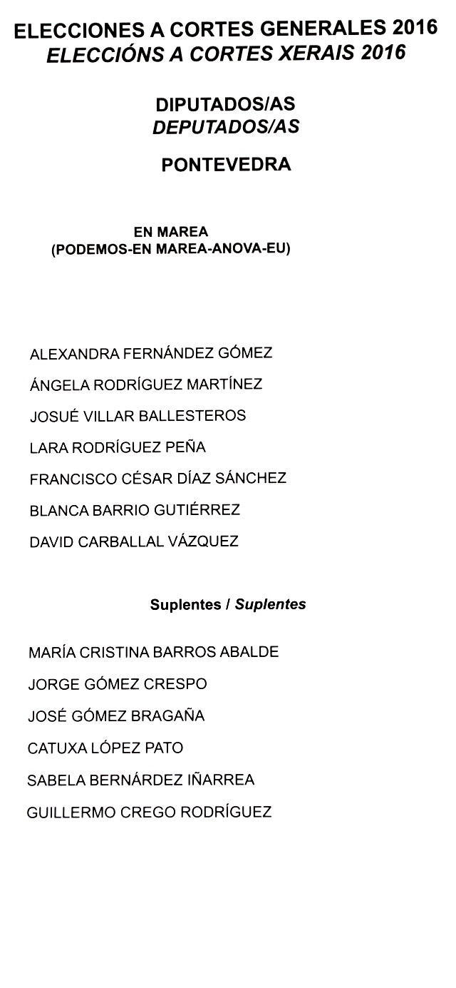 Papeletas electorales de las Elecciones a Cortes Generales de España de 2016, Provincia de Pontevedra.